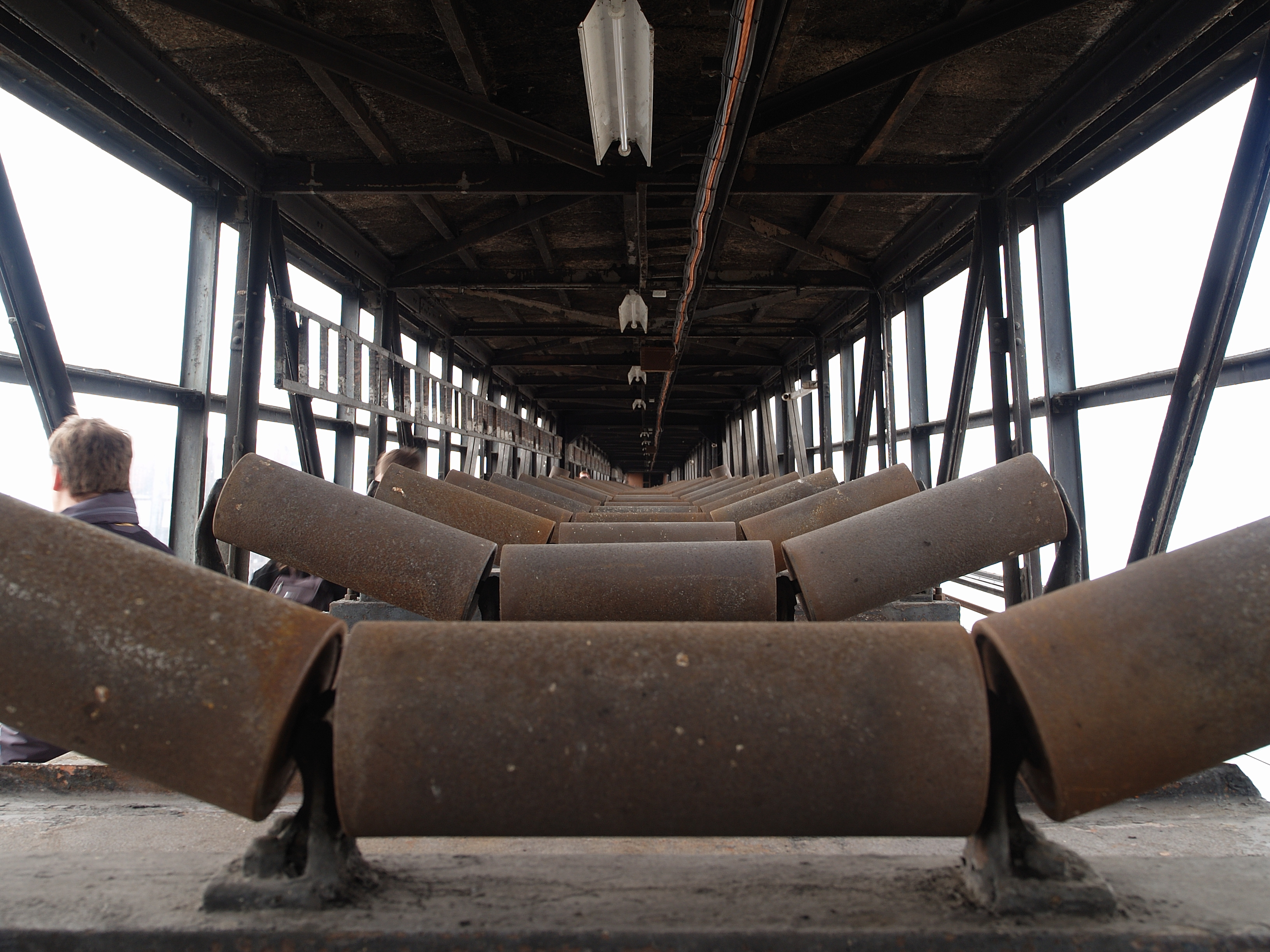 Die stillgelegte Kokerei Hansa in Dortmund, in der Bandbrücke zum Kohlenbunker